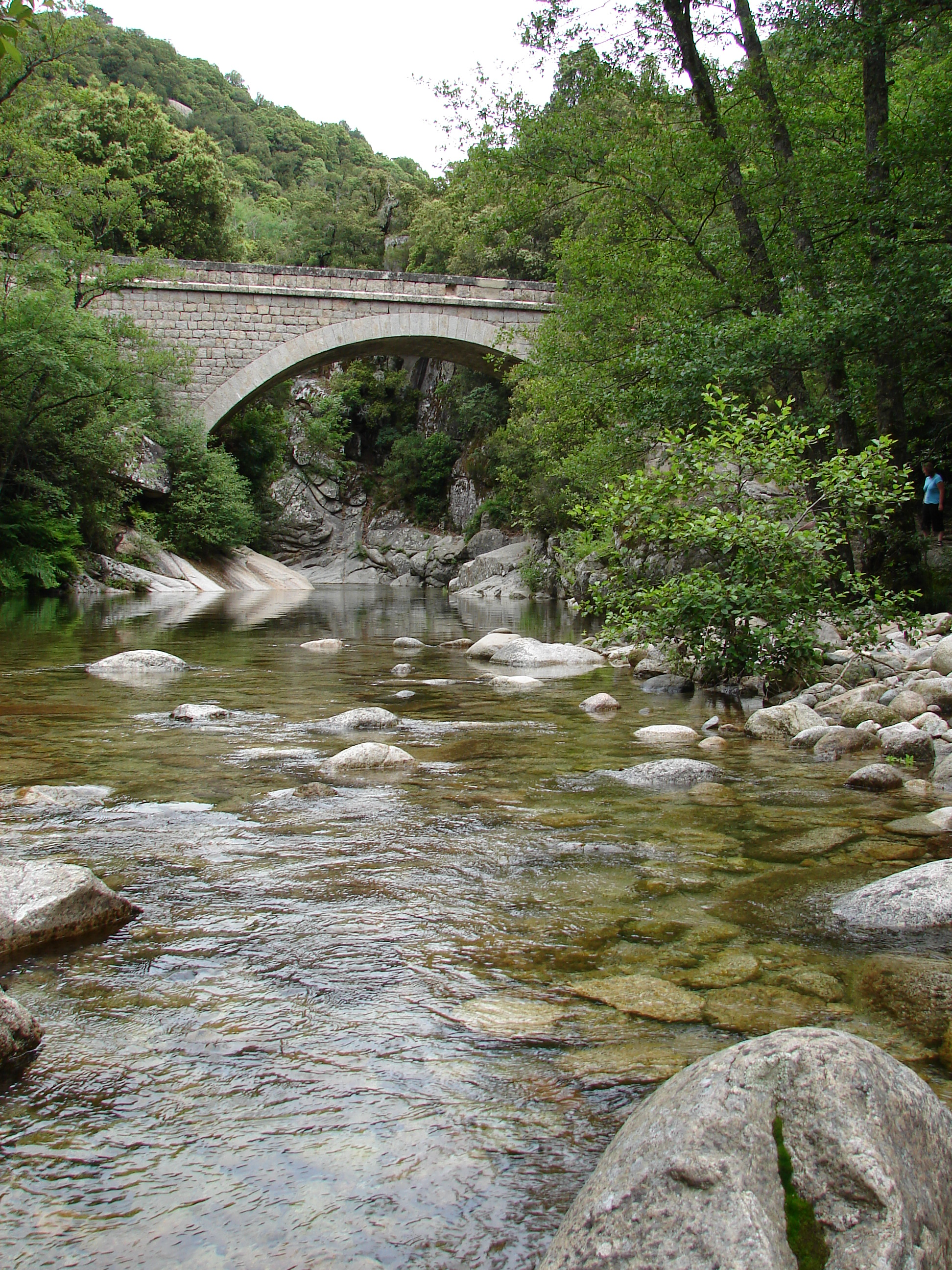 Stream, near Zonza